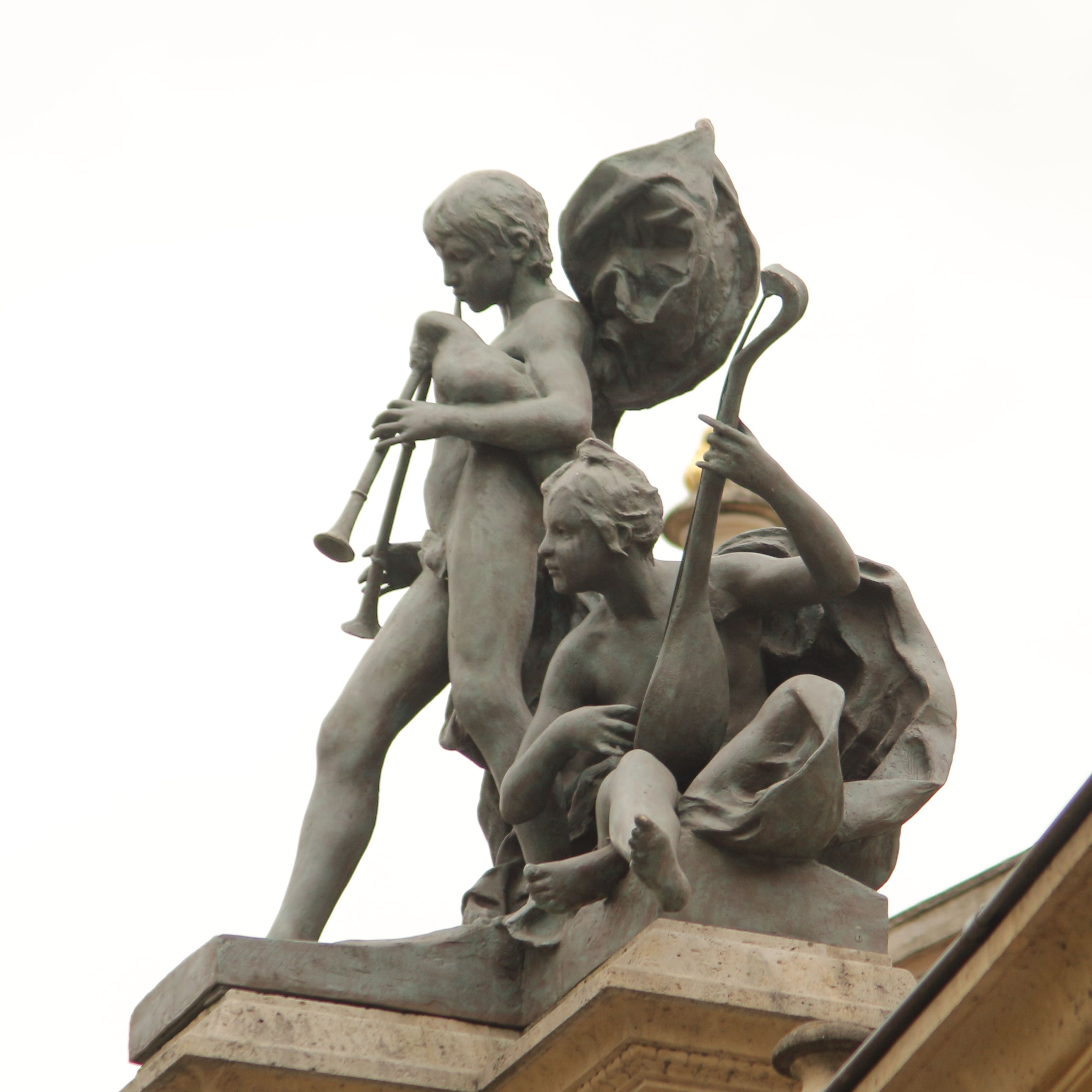 Groupe sculpté sur le toit du péristyle, dans la cour du Petit Palais (Paris), 1900. Zinc fondu. Sculpteur: Maurice Ferrary (1852-1904) Joueur de cornemuse et joueuse de luth.